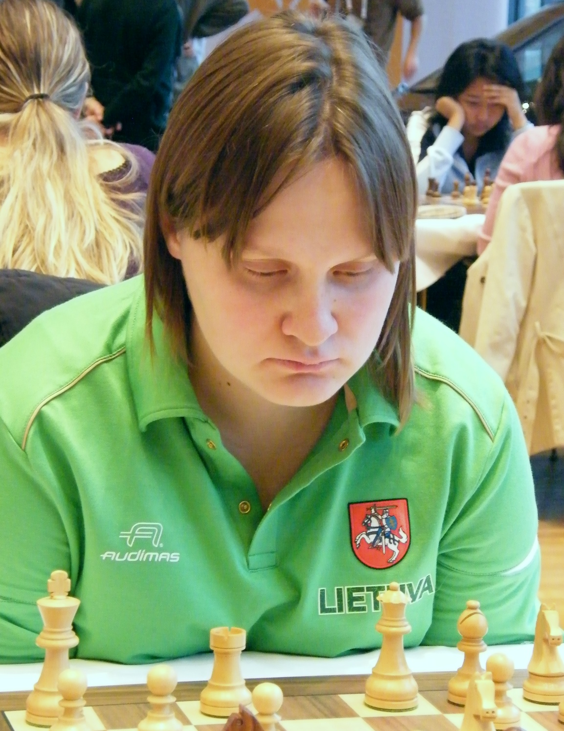 Zivile Sarakauskiene bei der 38. Schacholympiade in Dresden 2008